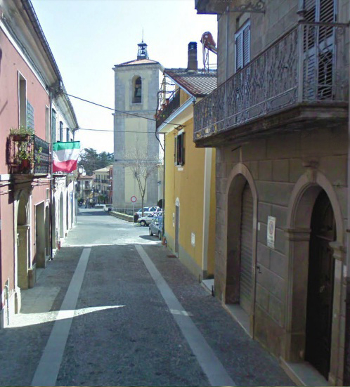 Via Colucci sbuca su Piazza Moscariello a Montella